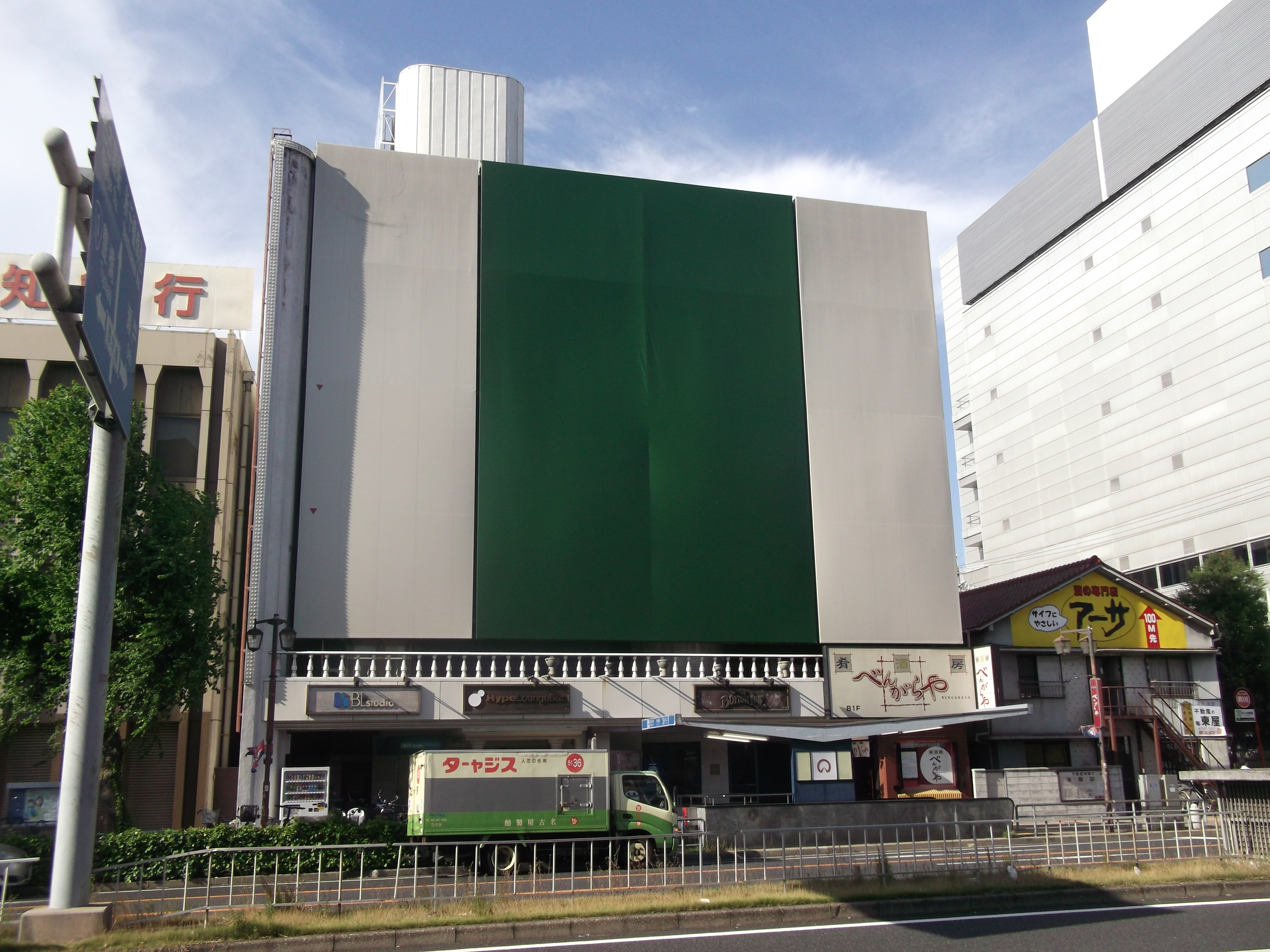 名古屋市千種区今池のボトムラインを南側公道より撮影